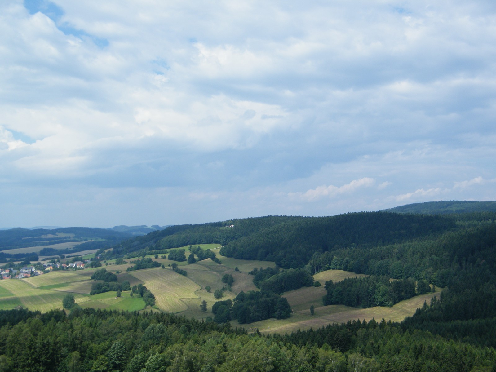 Wachberg (496 m) u Saupsdorfu, Saské Švýcarsko